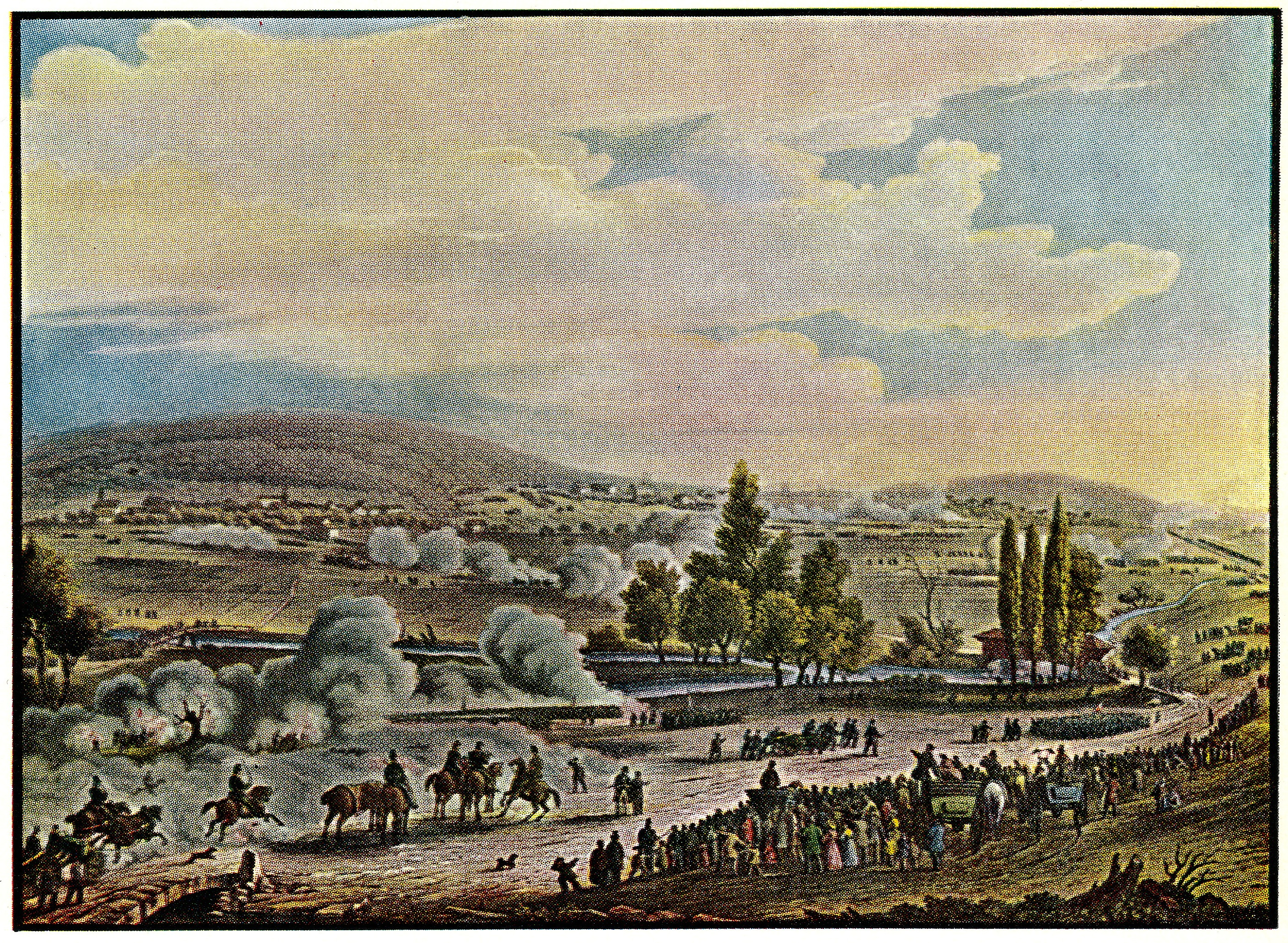 Feld-Manœuvre ostschweizerischer Cadetten vor Schwamendingen am 4. September 1856.